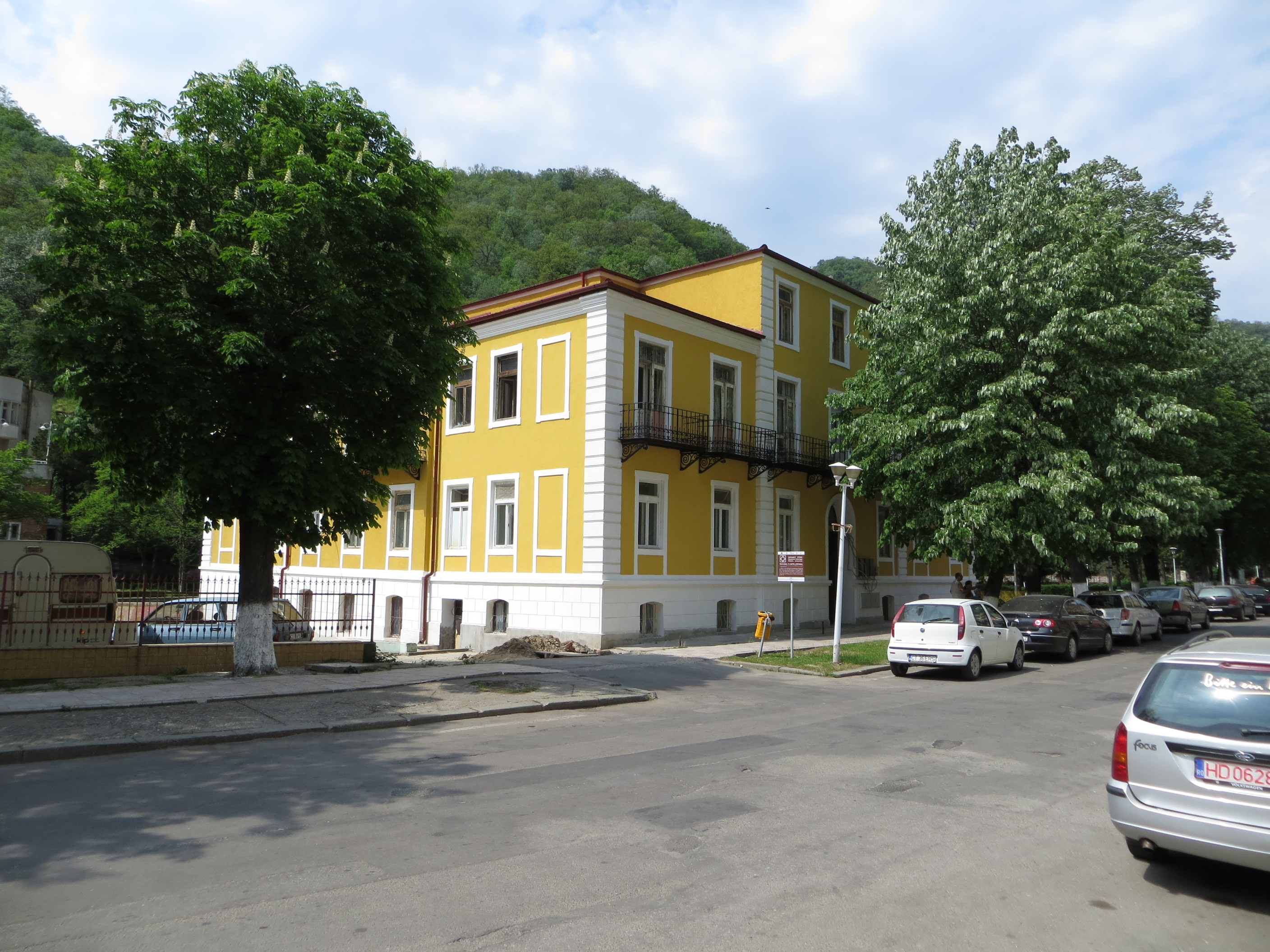 Pavilion 12, fost Hotel "Victoria", fost Hotel "Traian", azi locuințe sociale